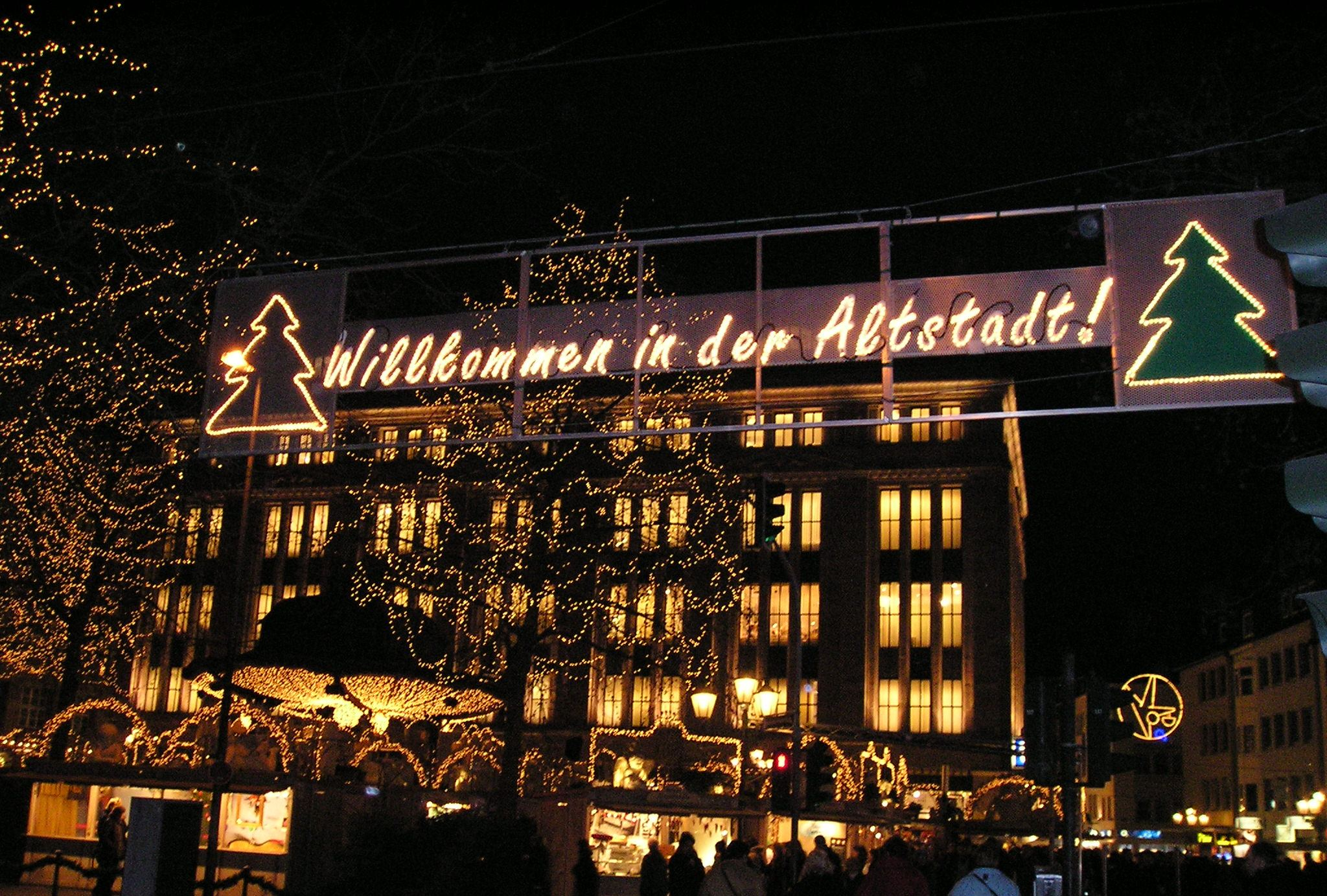 Christmas market in the Altstadt of Düsseldorf 2007, Musikpavillon, Heinrich-Heine-Platz